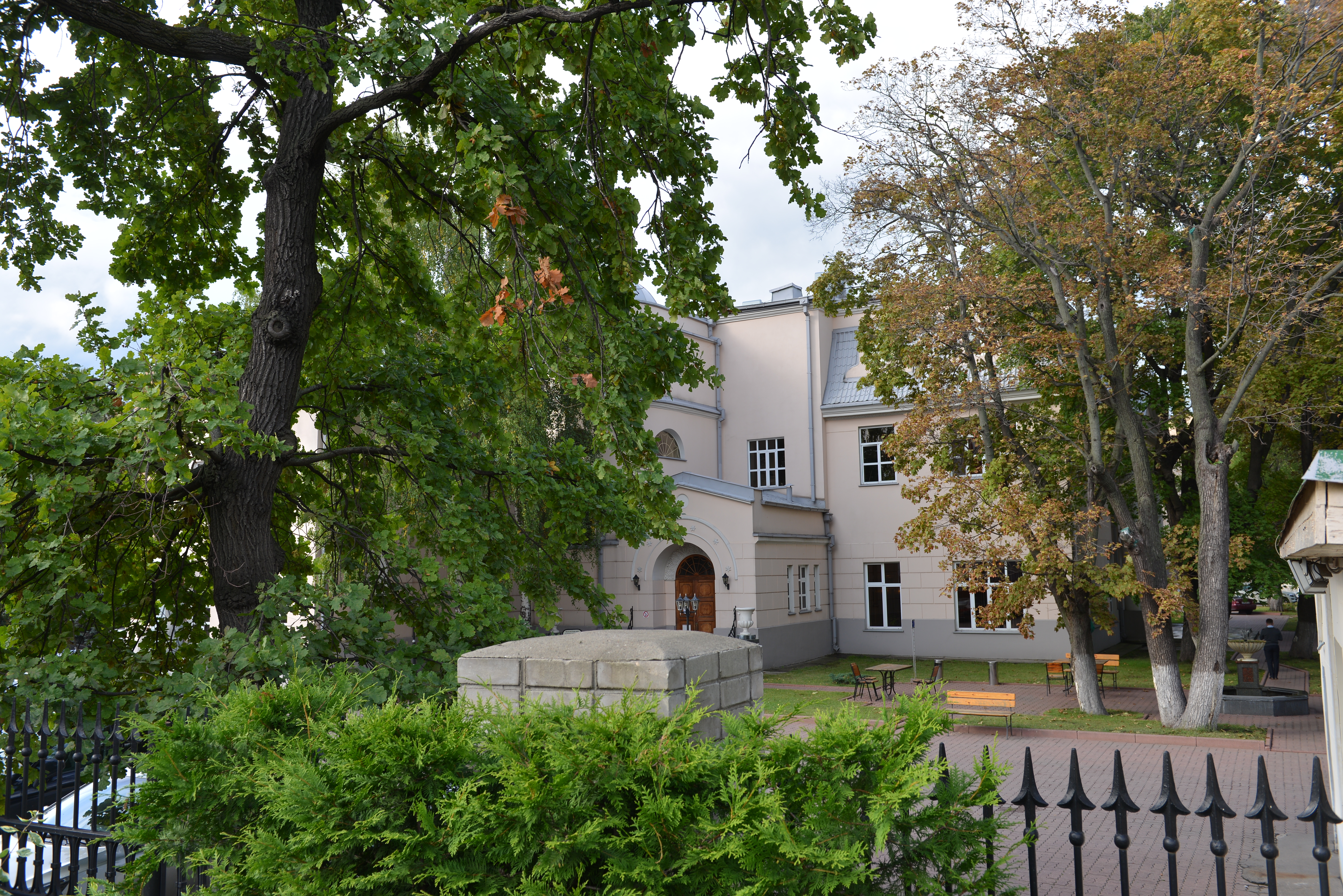 По мнению прихожан церкви Благовещения, это здание принадлежало Нарышкиным. Хотя на Гугле значится виллой Рябушинского. Где же тогда дача Нарышкиных, которую они обещали "перенести свою дачу на подобающее расстояние от нового храма", если там рядом больше никаких дач нет?